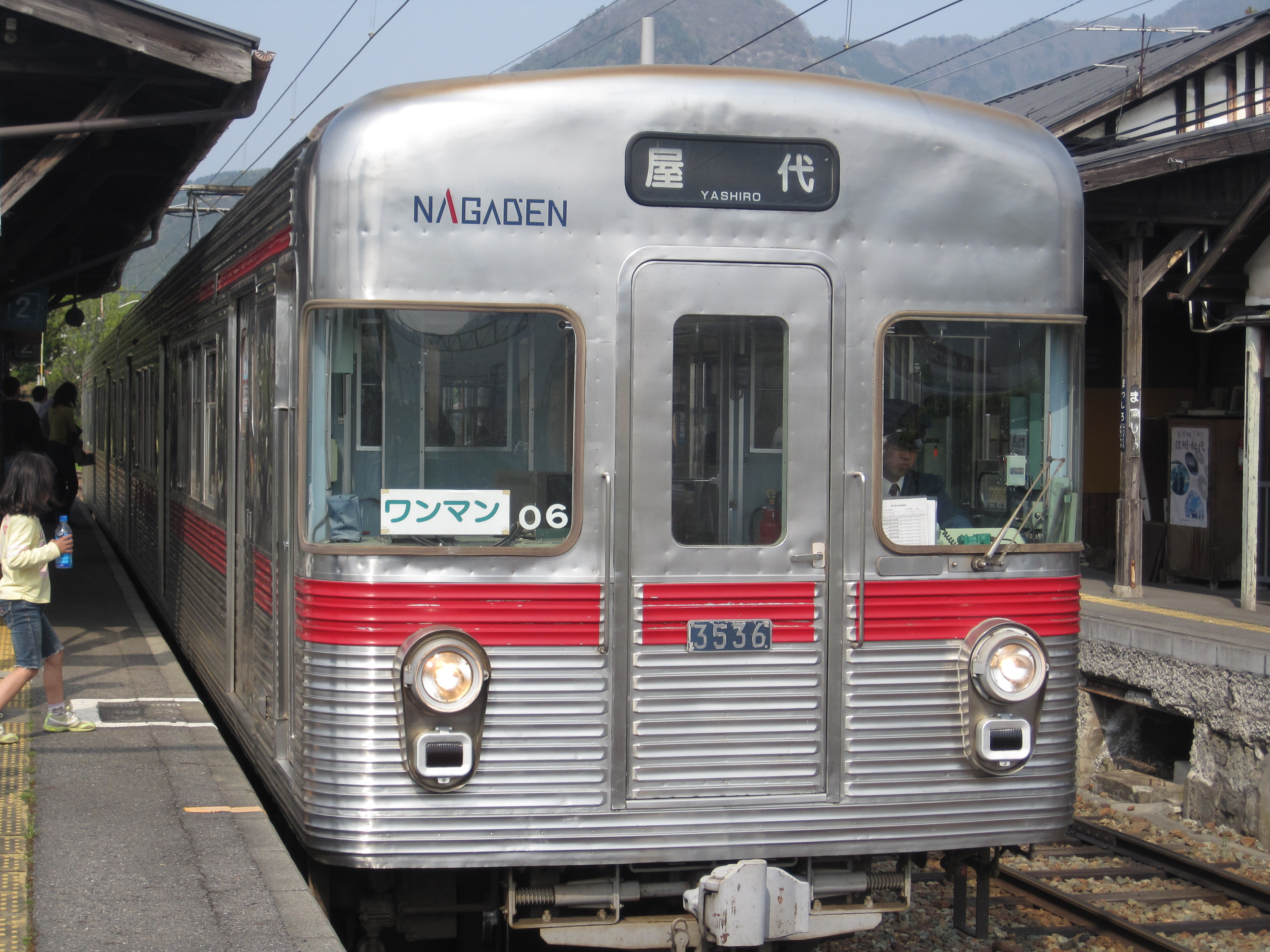 松代駅で撮影。